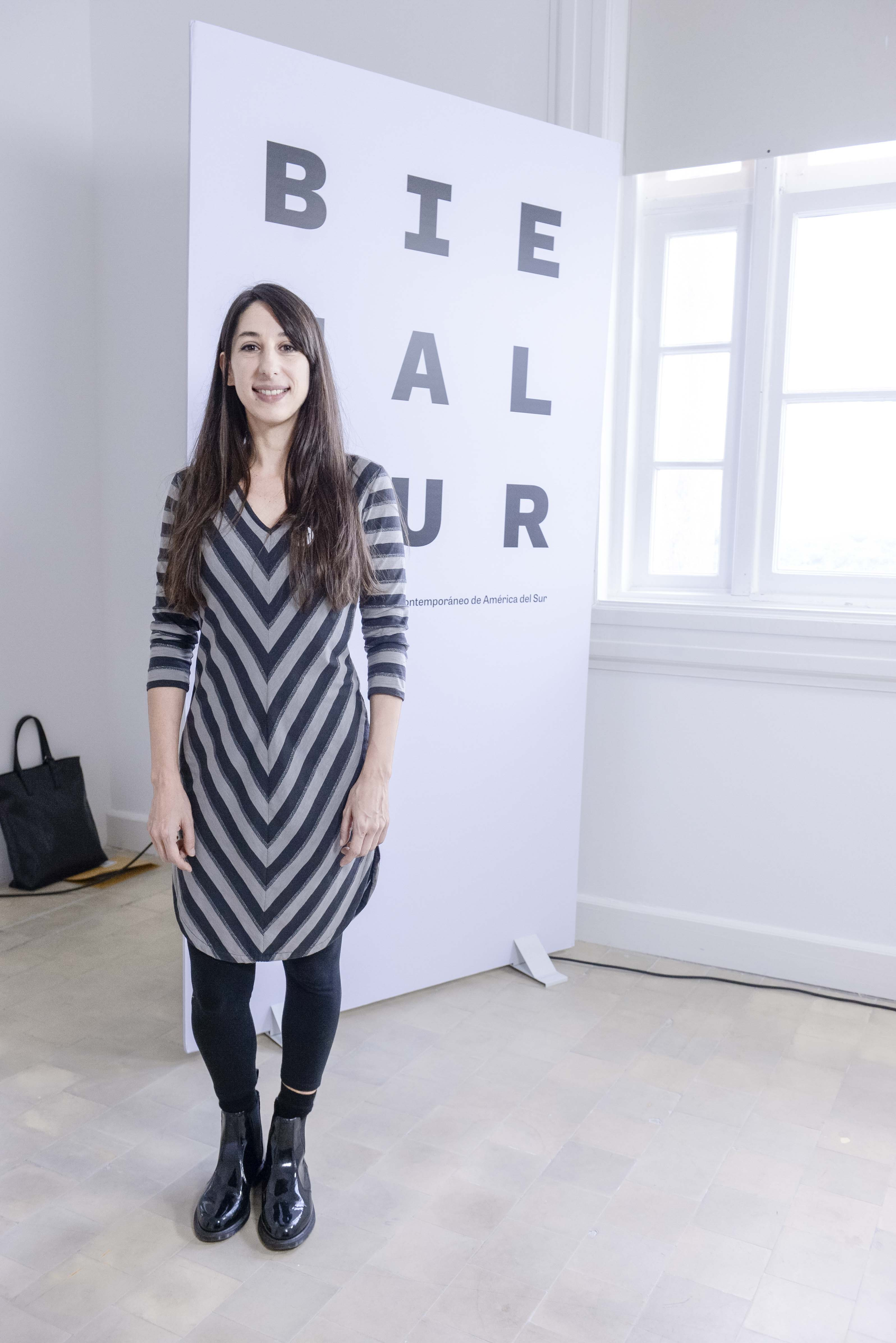 Fotografías de los invitados y participantes de la Bienal Sur 2016, realizada por la Universidad de Tres de Febrero.